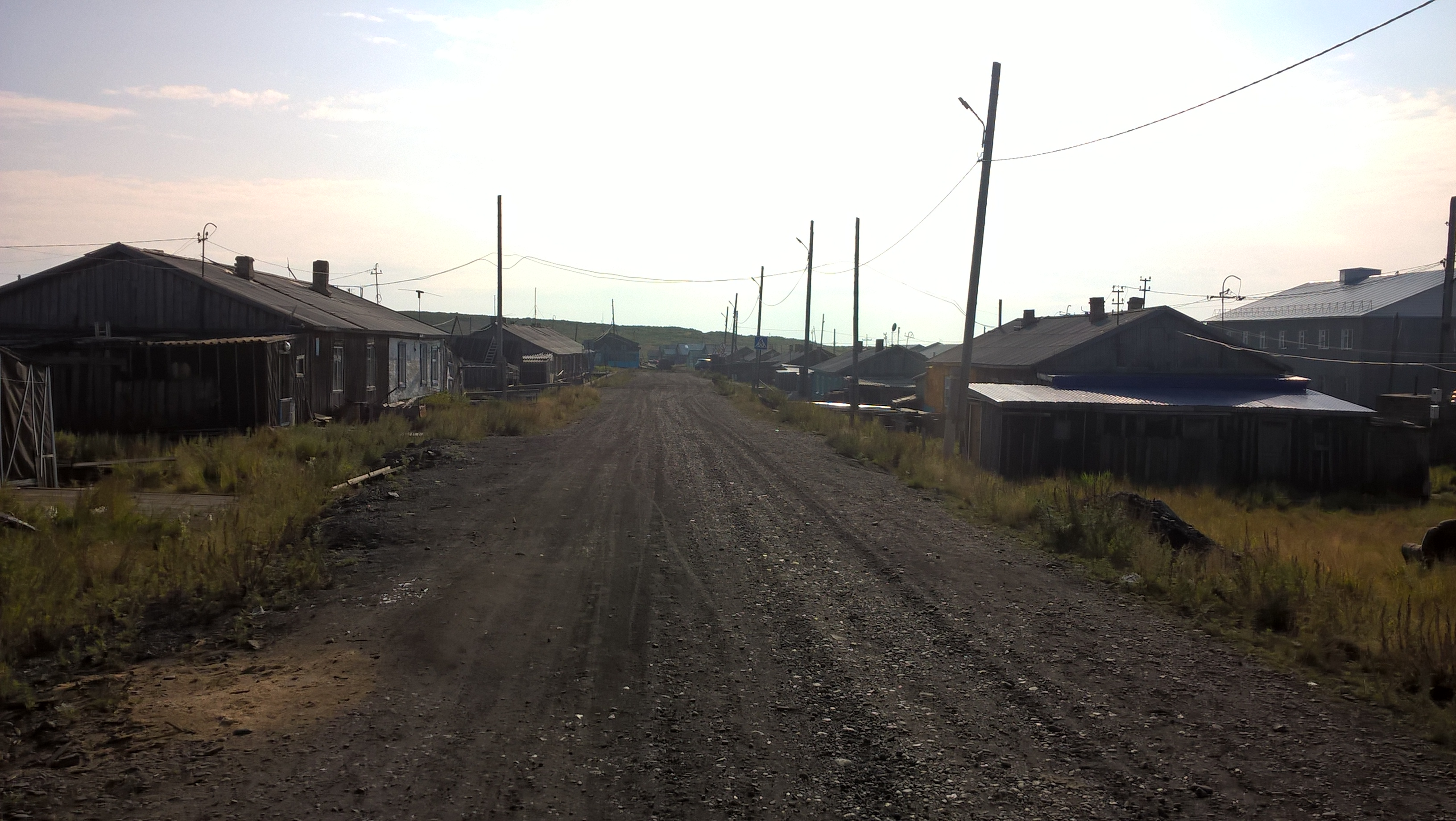 улица Гагарина, село Караул, Красноярский край.